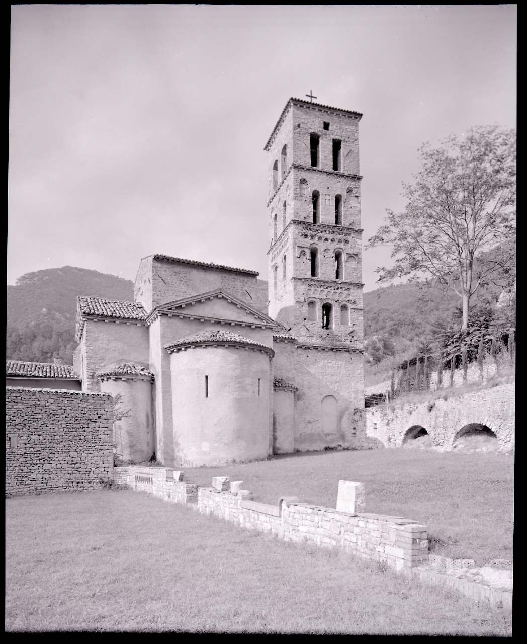 San Pietro in Valle. Ferentillo. Abbazia. Esterni e interni. Altare con lastre scolpite a bassorilievo di epoca longobarda. Sarcofago scolpito, sec. II.] Servizio fotografico : Ferentillo, 1967 / Paolo Monti. - Buste: 7, Fototipi: 7 : Negativo b/n, gelatina bromuro d'argento/ pellicola ; 10x12. - ((Serie costituita da 7 buste sciolte di negativi identificati con i nn.: 13977, 13978, 13979, 13980, 13981, 13982, 13983. - Occasione: Documentazione per la pubblicazione: Cecchi Emilio, Sapegno Natalino (a cura di), "Storia della Letteratura Italiana", 9 voll., Milano, Garzanti, 1966 e segg. - Fonte: Monografia di Cecchi Emilio, Sapegno Natalino (a cura di): Storia della Letteratura Italiana, 9 voll., Milano, Garzanti (1966 e segg.). - Fonte: Agenda di Paolo Monti: Monti/ 3 aprile 1966 - 9 marzo 1971/ 12421-16823 (1966-1971), presso Archivio Paolo Monti